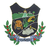 Brasão de armas do município de Piumhi, Minas Gerais, Brasil.